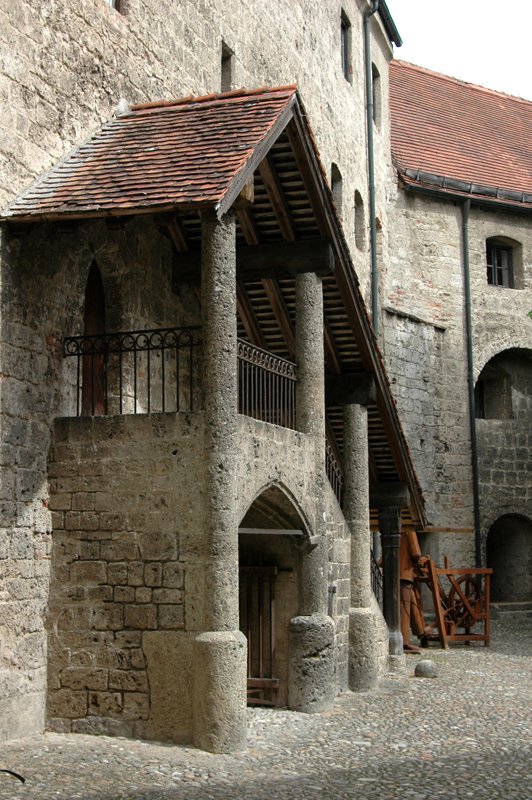 Burg zu Burghausen, Aufgang zur Kemenate in der Hauptburg